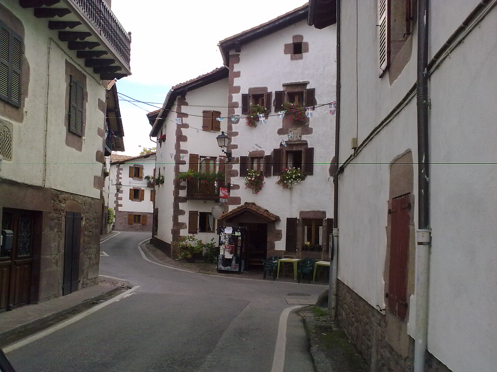 Erratzu